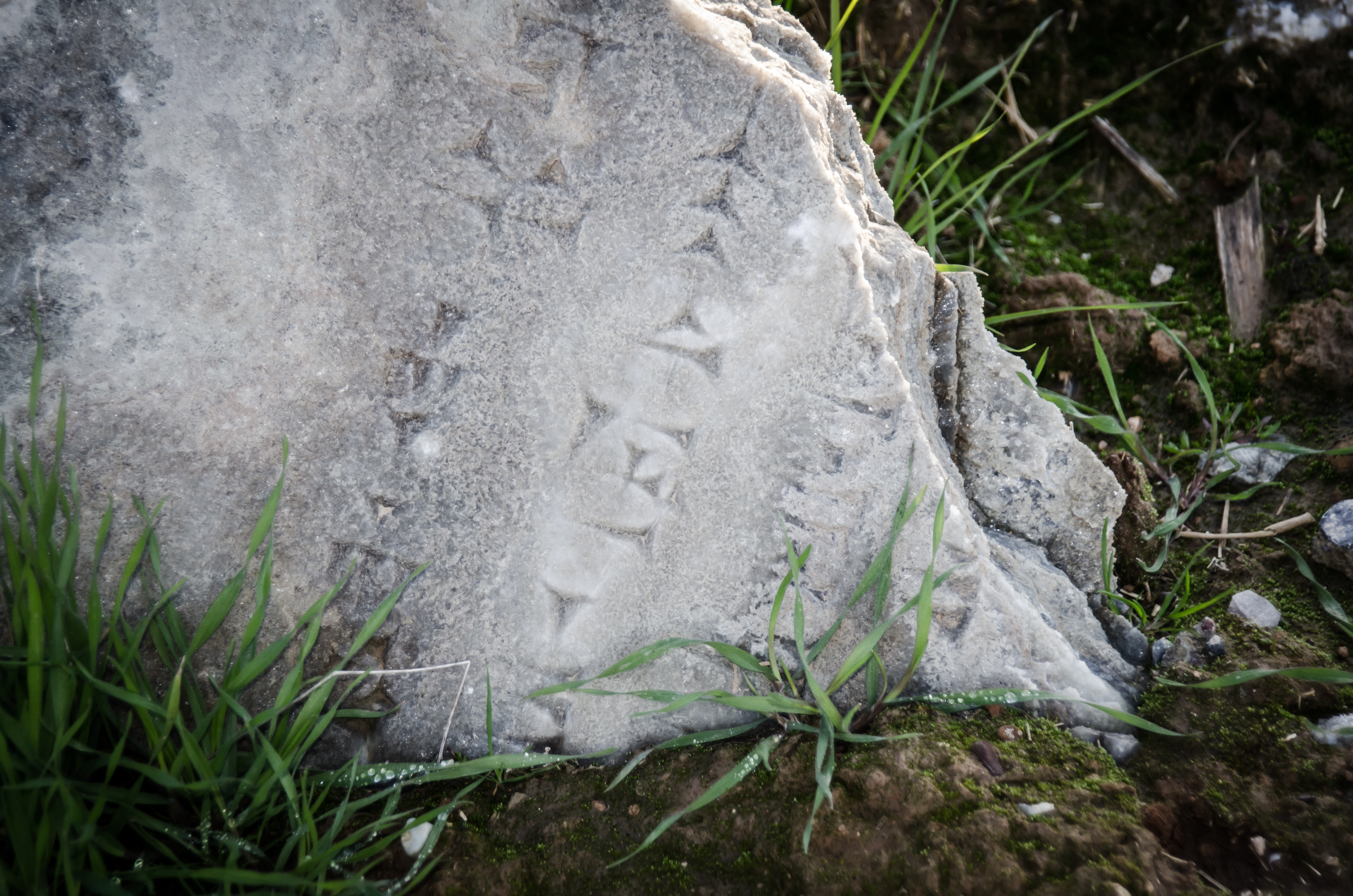 Trümmerteil mit Keilschrift nach der Zerstörung durch den IS. (Januar 2019)